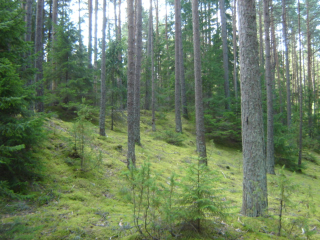 Purtsa maalinna nõlv mändidega